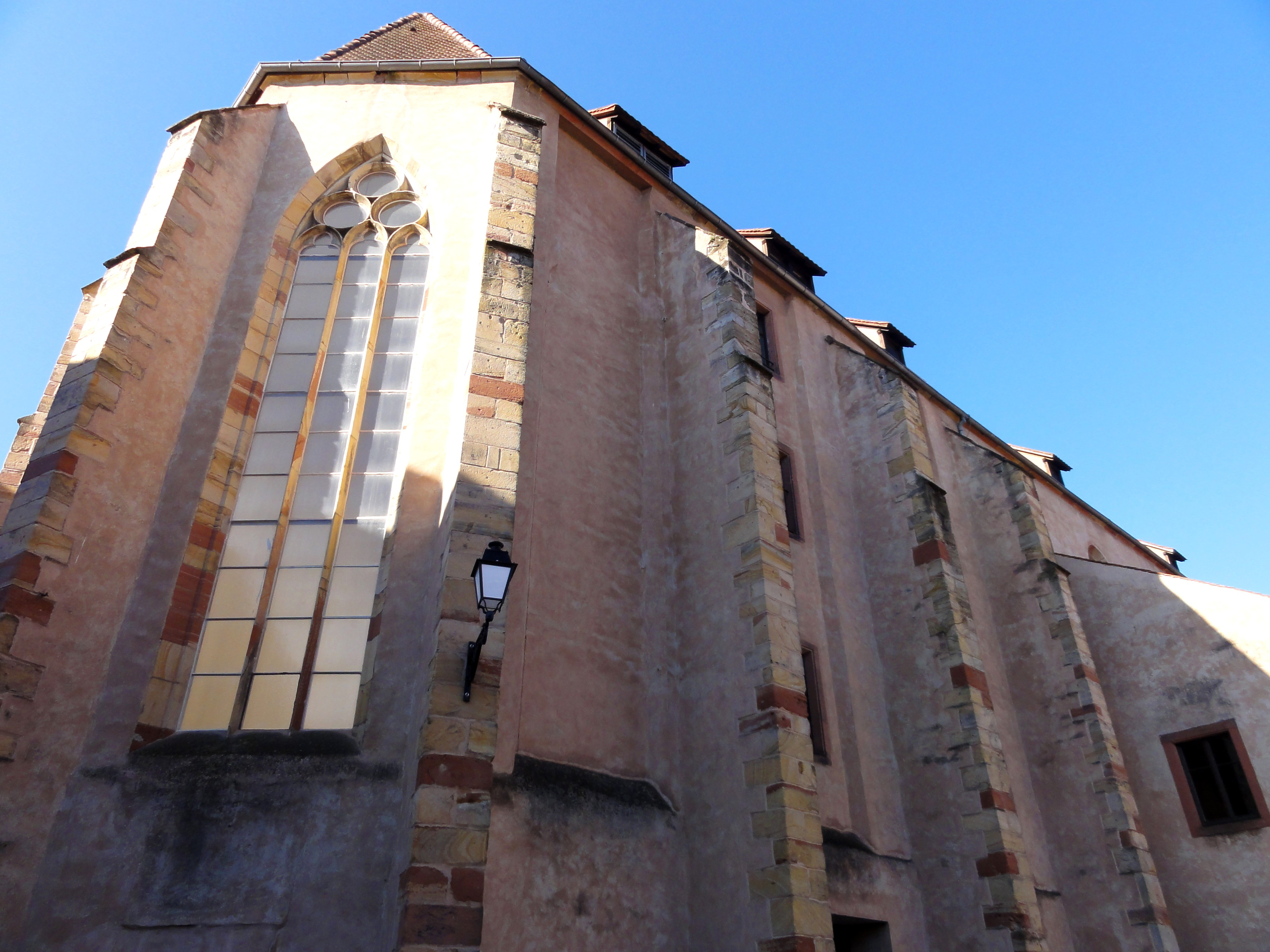 Alsace, Bas-Rhin, Wissembourg, Ancien Couvent des Dominicains, actuellement relais culturel, rue de l'École et rue des Dominicains (PA00085245, IA67008055).